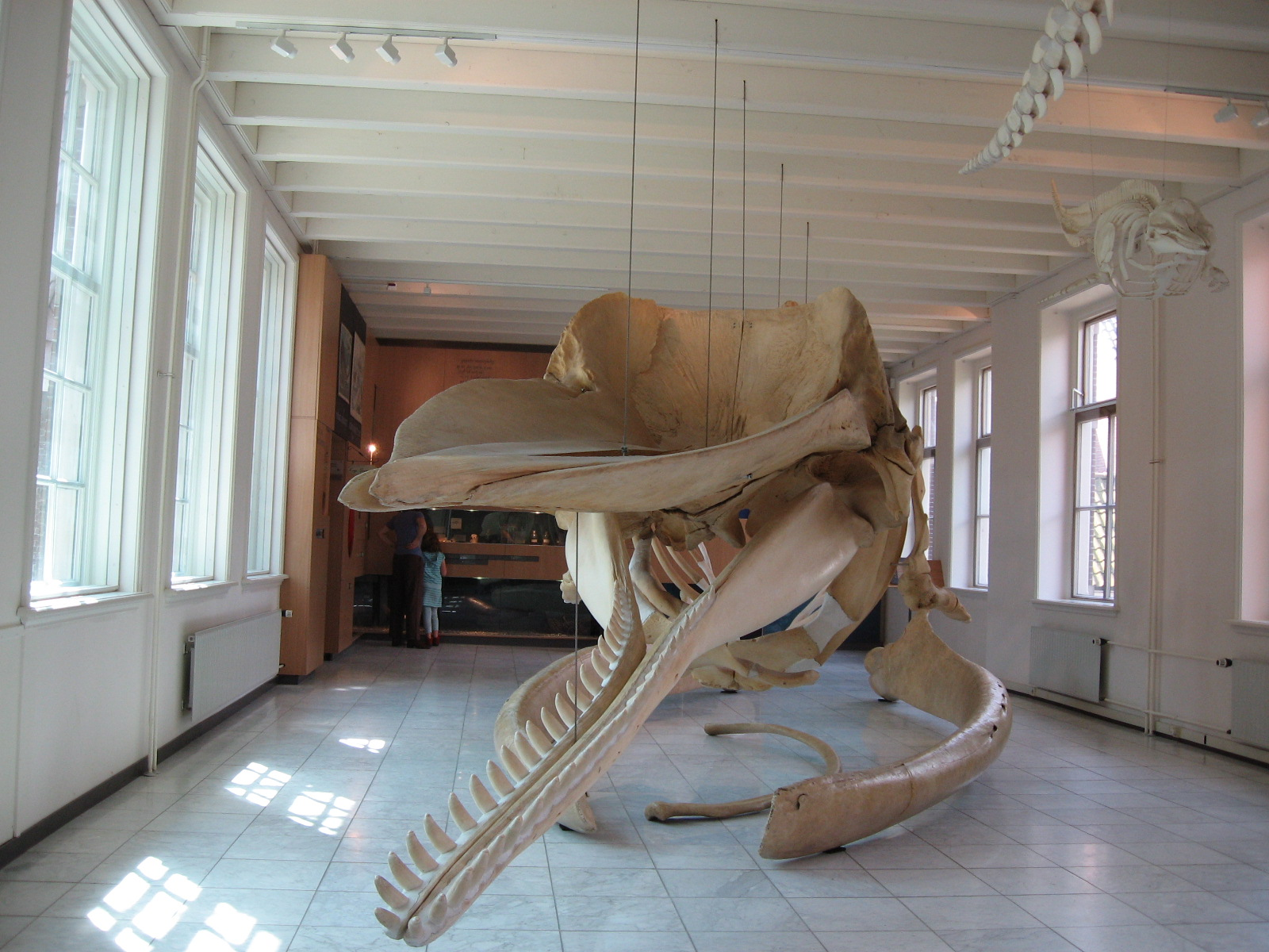 Walviszaal in het Natuurmuseum Fryslân